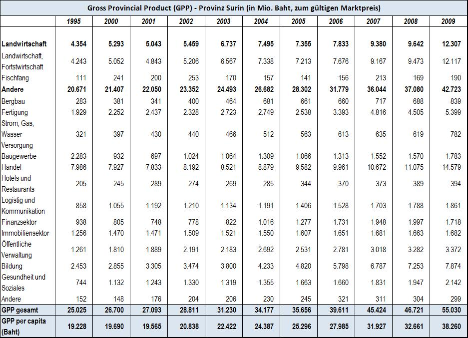 Gross Provincial Product (GPP) der Provinz Surin (in Mio. Baht, zum gültigen Marktpreis)